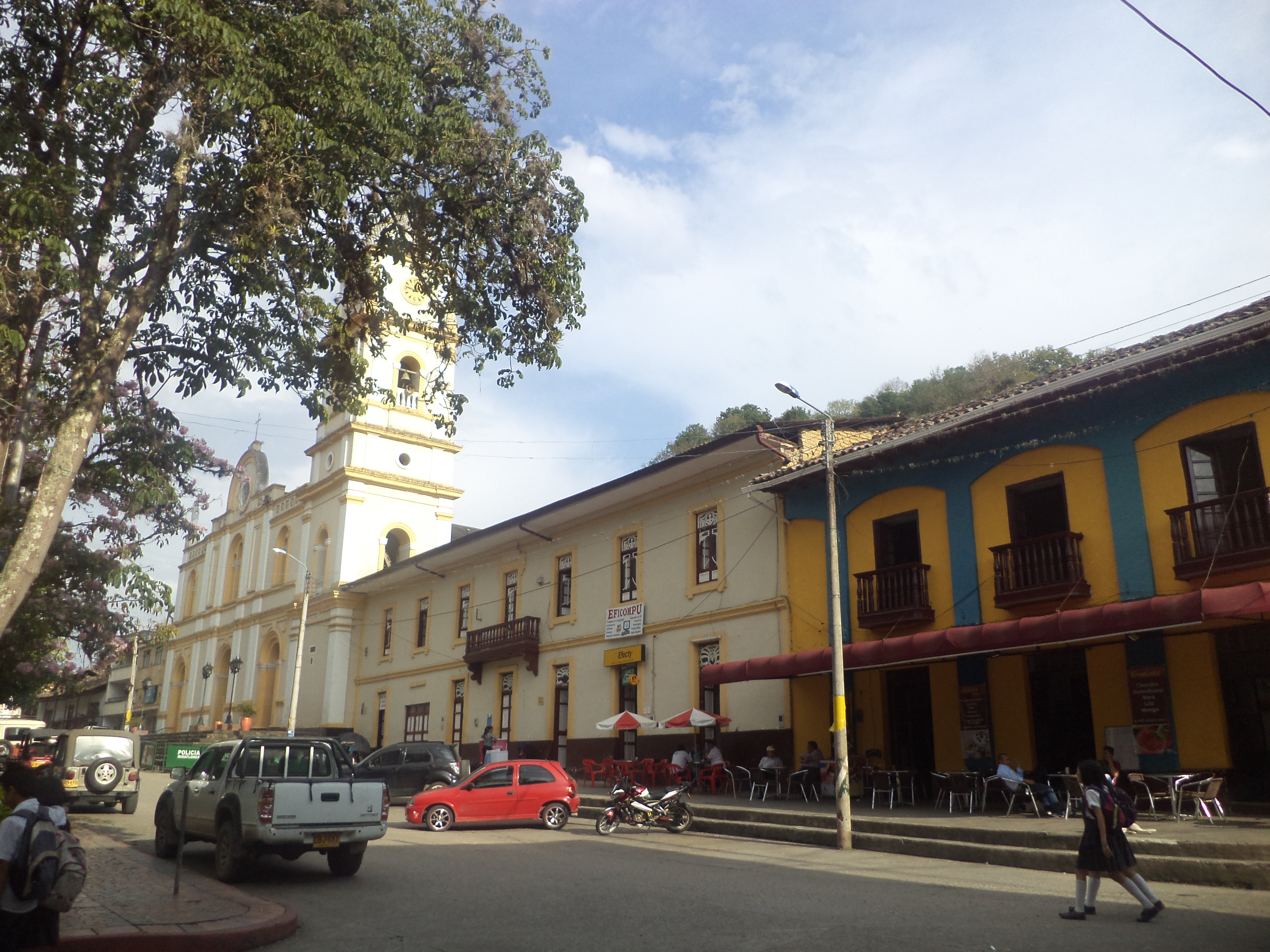 Parroquia San Joaquin de Miraflores.